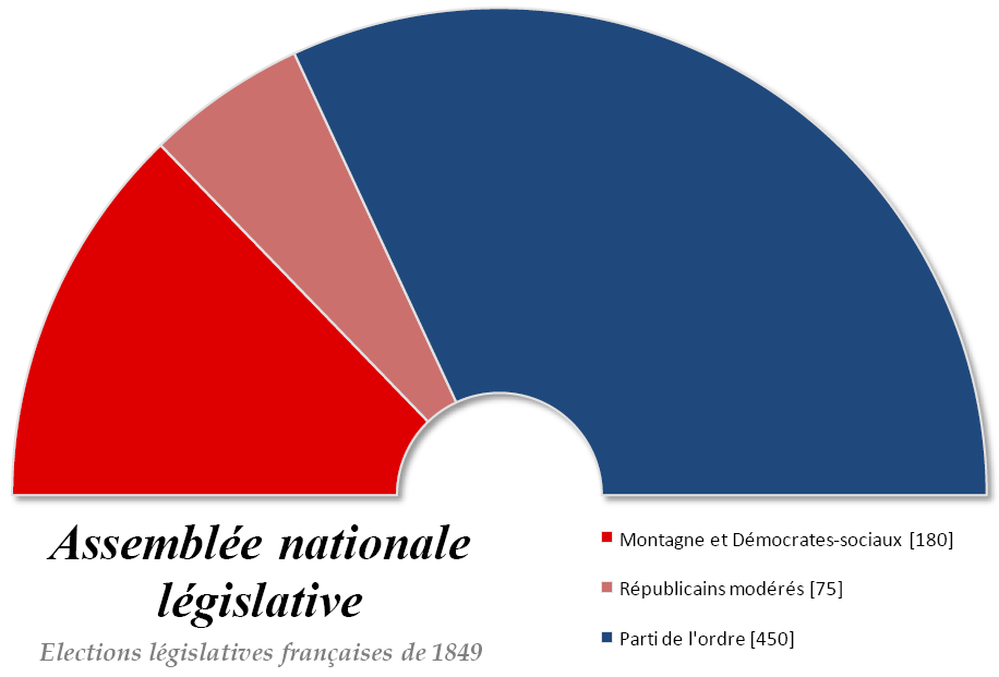 Assemblée nationale législative française élue les 13 et 14 mai 1849